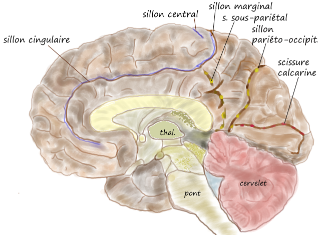 sillons sur la face médiane du cerveau humain; dessin à la main (tablette + Artweaver) d'après une pièce anatomique du Digital Anatonist